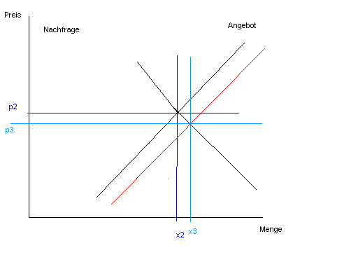 Preis-Absatz-Funktion zur Darstellung der Allokationsfunktion des Preises